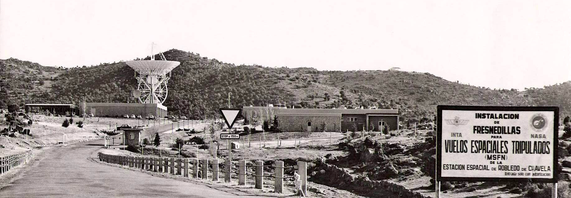 Carretera de acceso, al fondo puede verse la antena X-Y de 26 metros y a a derecha el cartel original.